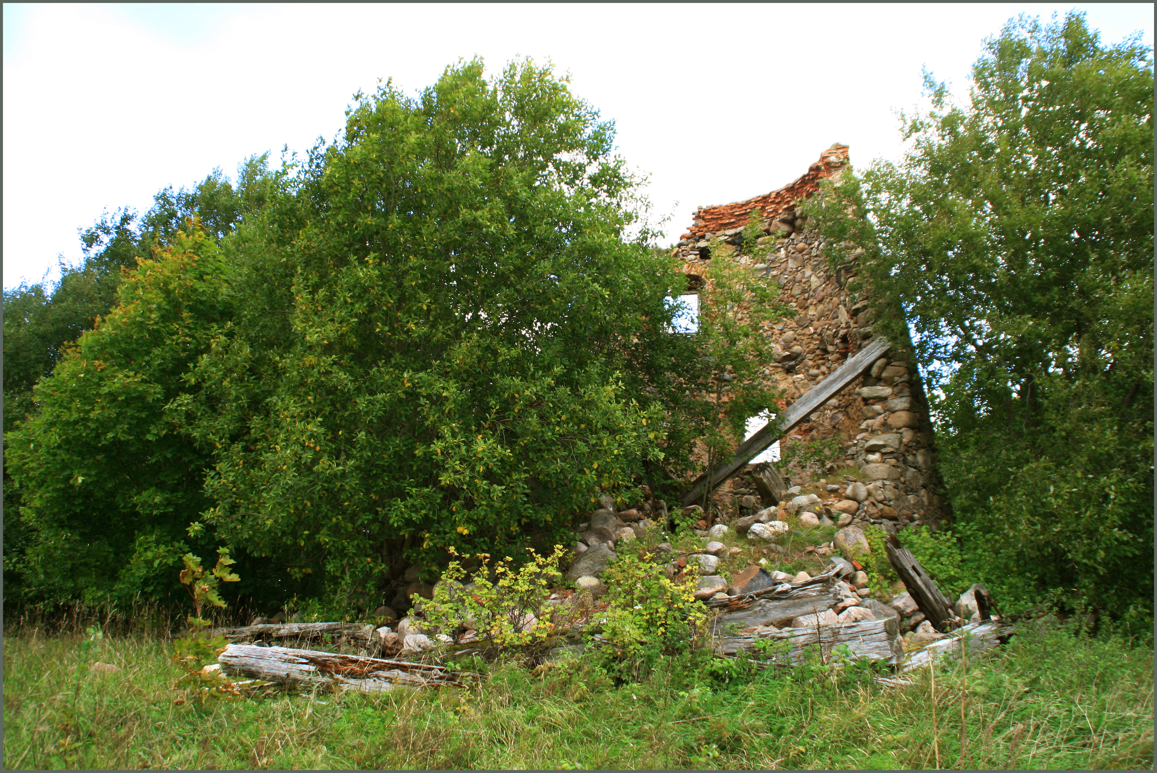 Vīdales vējdzirnavas / Mill's Ruins